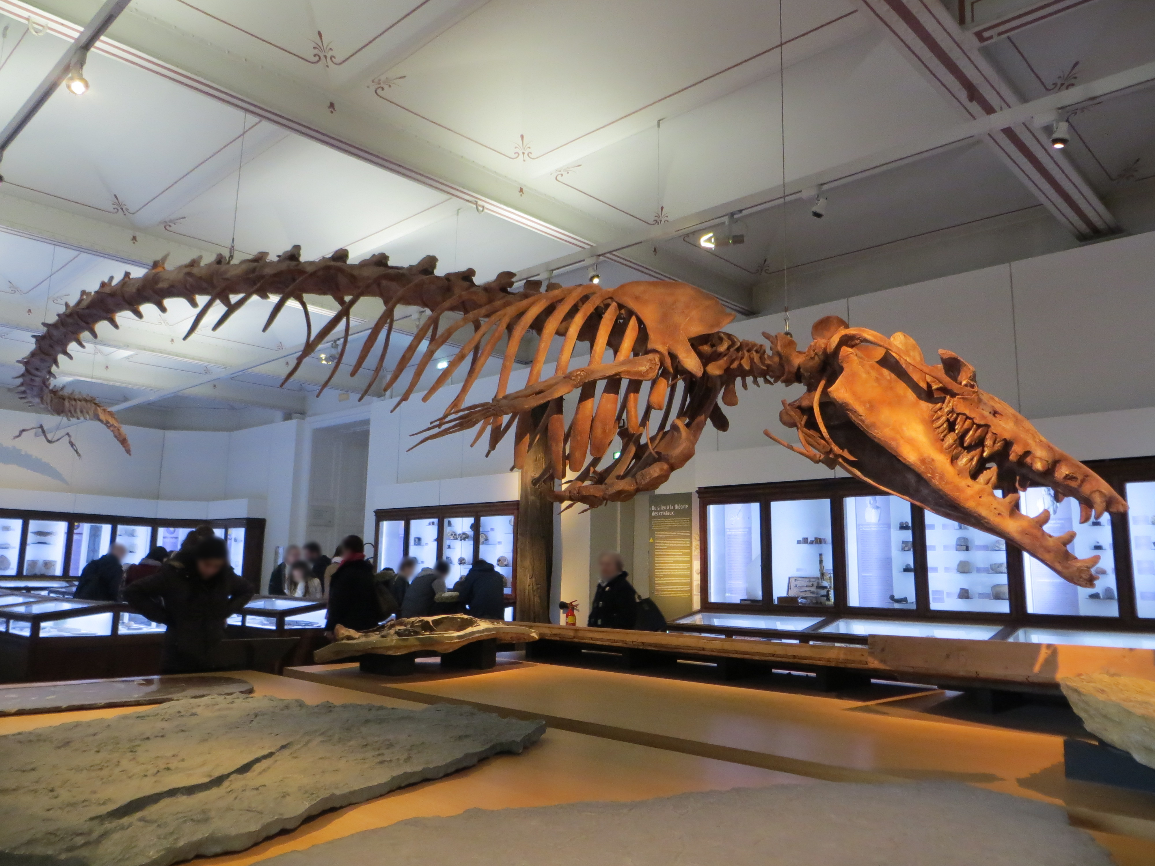 Moulage du squelette fossile de Basilosaurus isis, au Museum d'Histoire Naturelle de Nantes.